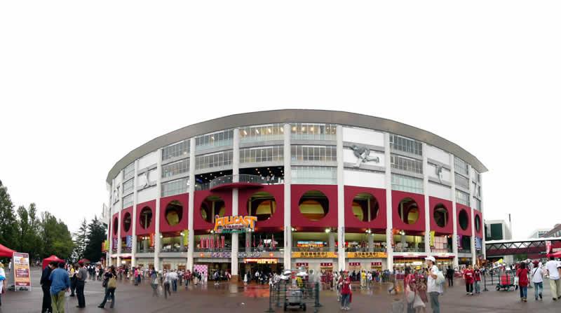 2006年3月に完成した第二期のフルキャストスタジアム宮城。 撮影日は2006年9月18日(東北楽天対北海道日本ハム)。 投稿者により撮影。 2006年9月21日 (木) 15:37 . . Gomurafuji . . 800×447 (44,177 バイト)